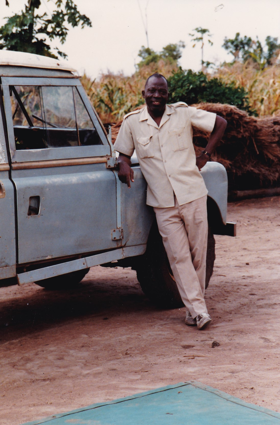 Thierry Durand, son gendre, j'ai pris cette photo à Kouméa au Togo en 1985